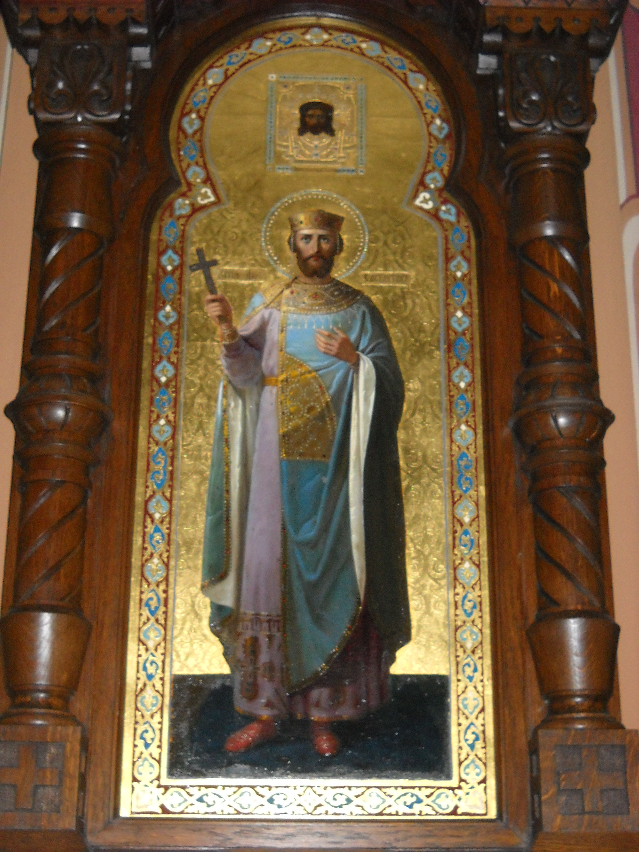 Ikona Świętego Równego Apostołom cesarza Konstantyna w cerkwi w Piotrkowie Trybunalskim, XIX w.